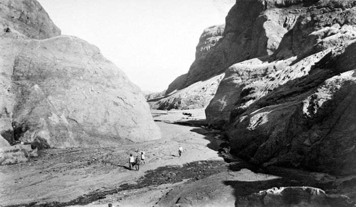 Repronegatief. Een groep mensen loopt door het vulkaanlandschap 'Lahar Badak' opweg naar de krater van de vulkaan Keloed op Oost-Java na de uitbarsting van 1919